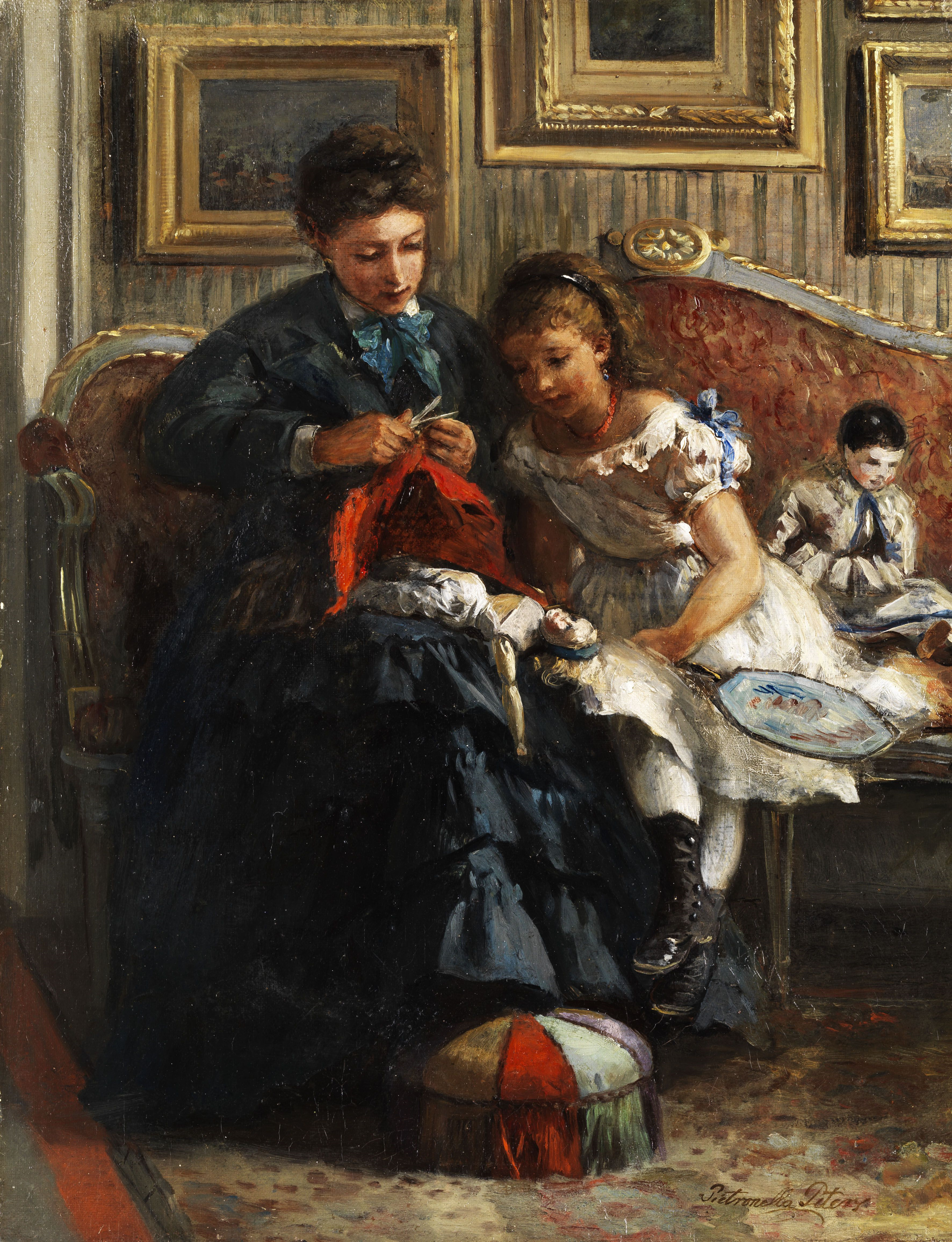 Das neue Puppenkleid. Öl auf Karton. 44,5 x 35 cm.